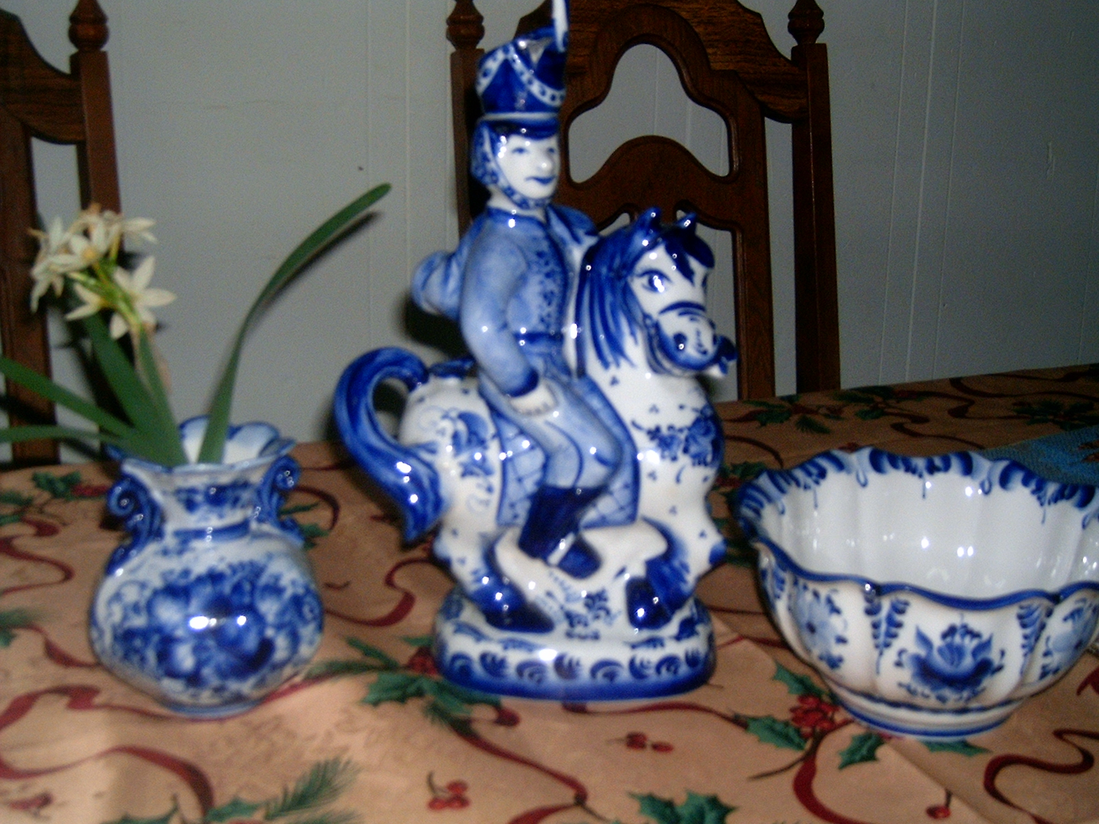 Частная коллекция гжель